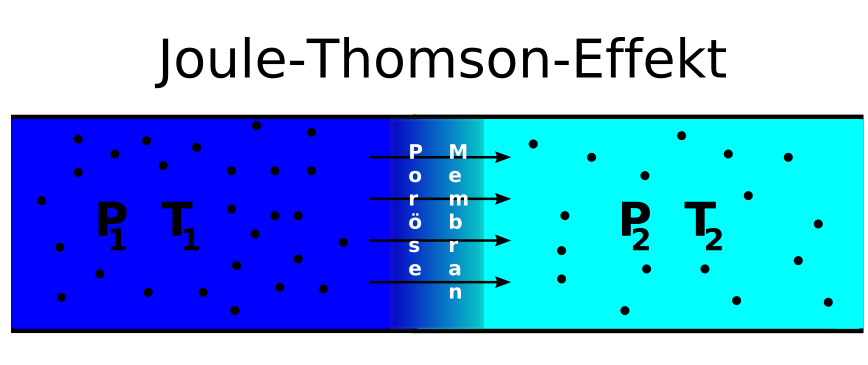 Schematische Darstellung des Joule-Thomson-Expansionsprozesses, zum Beispiel zur Kühlung